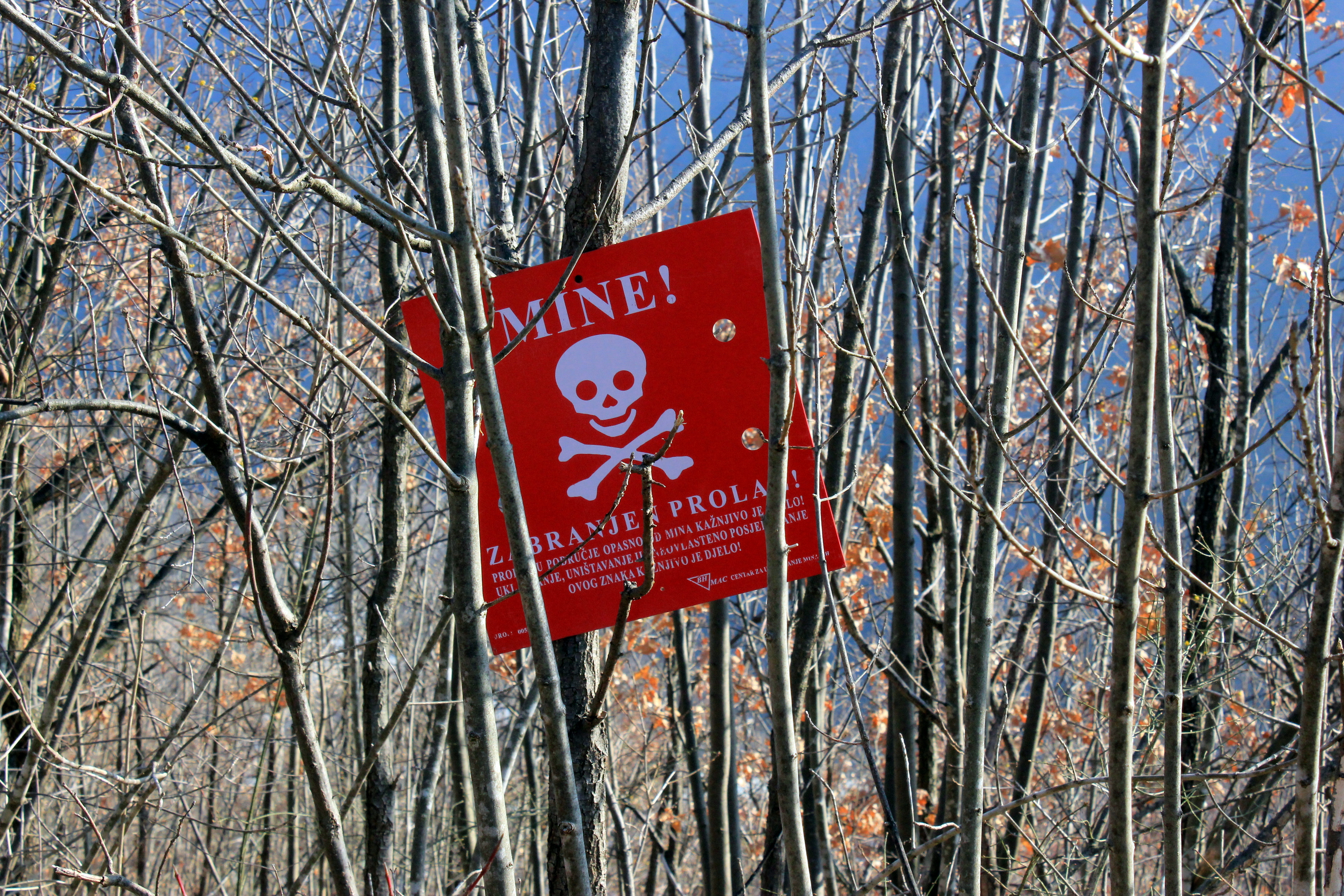 Minenwarnschild im Wald auf der Hrastova glava östlich von Sarajevo.